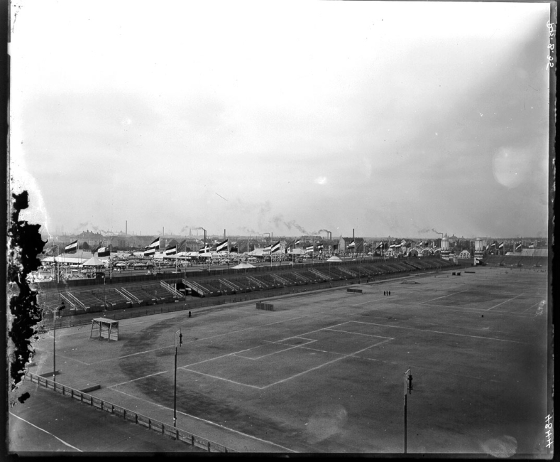 Deutsches Turnfest 1913 in Leipzig, Blick auf den großenTurnplatz